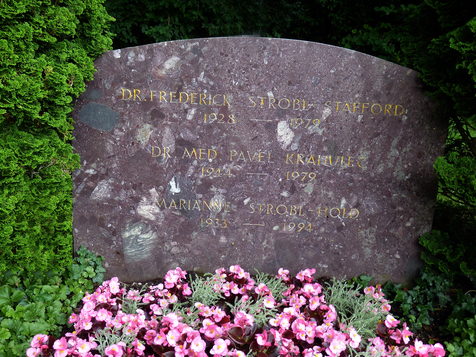 Marianne Strobel-Hold (1933–1994) Schauspielerin, Malerin, Grab auf dem Friedhof Witikon, Zürich